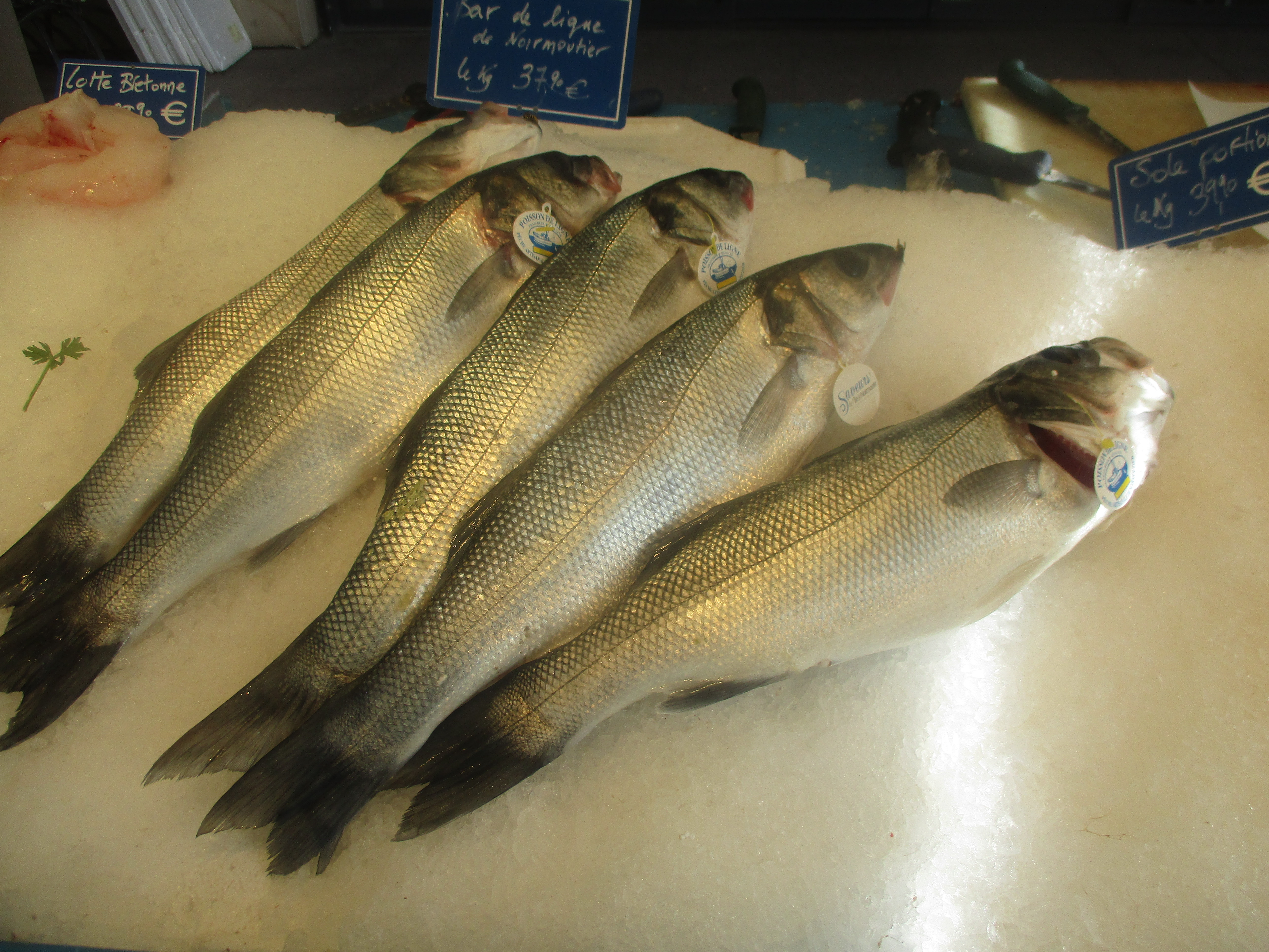 Bars de ligne de Noirmoutier au marché de Levallois-Perret.